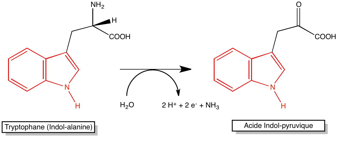 TDA formule